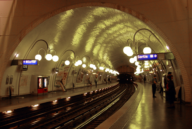 Metro Cité, Paris